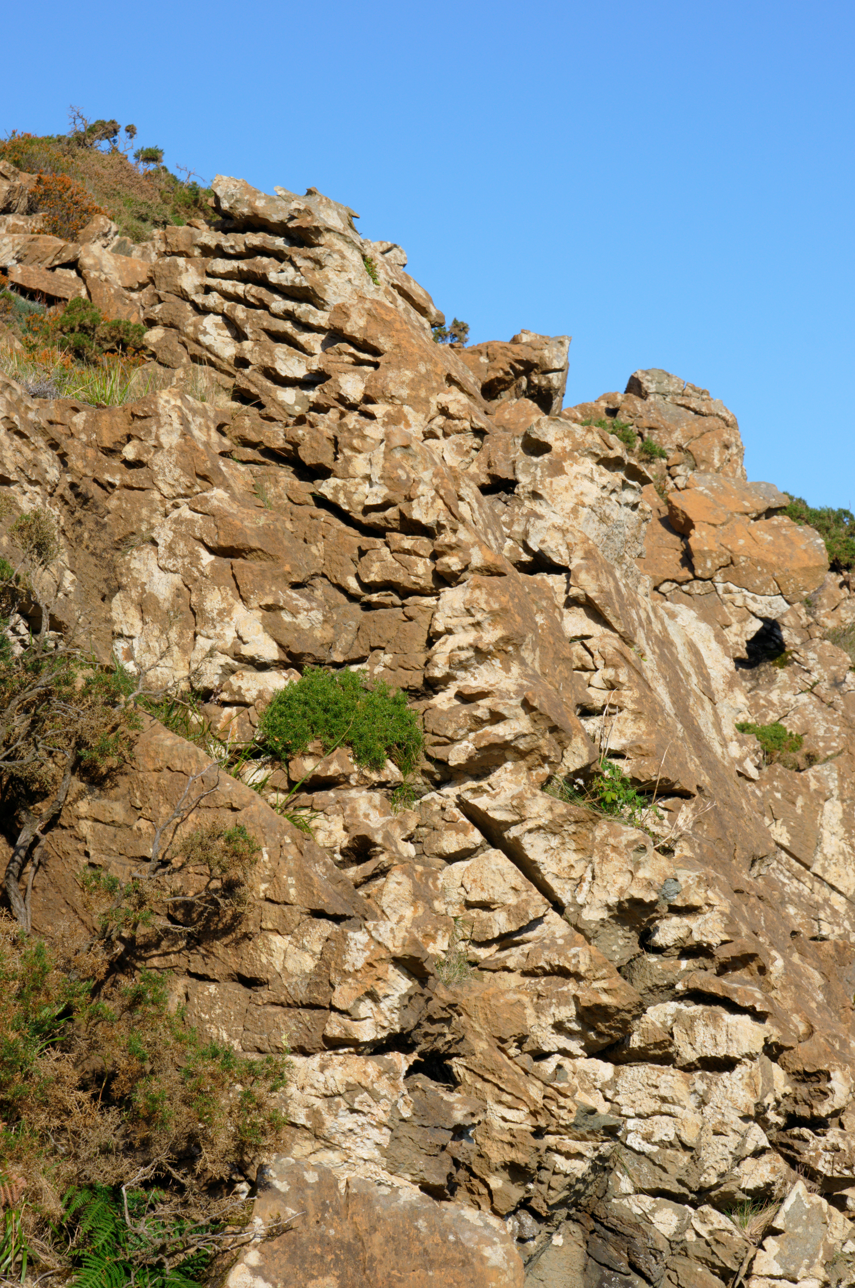 Serra da Capelada, Galicia: Karst serpentínico en peridotita ultrabasocá